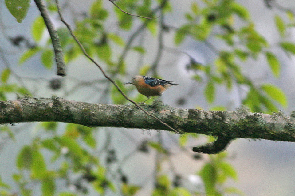 Tashigang to Norphang La